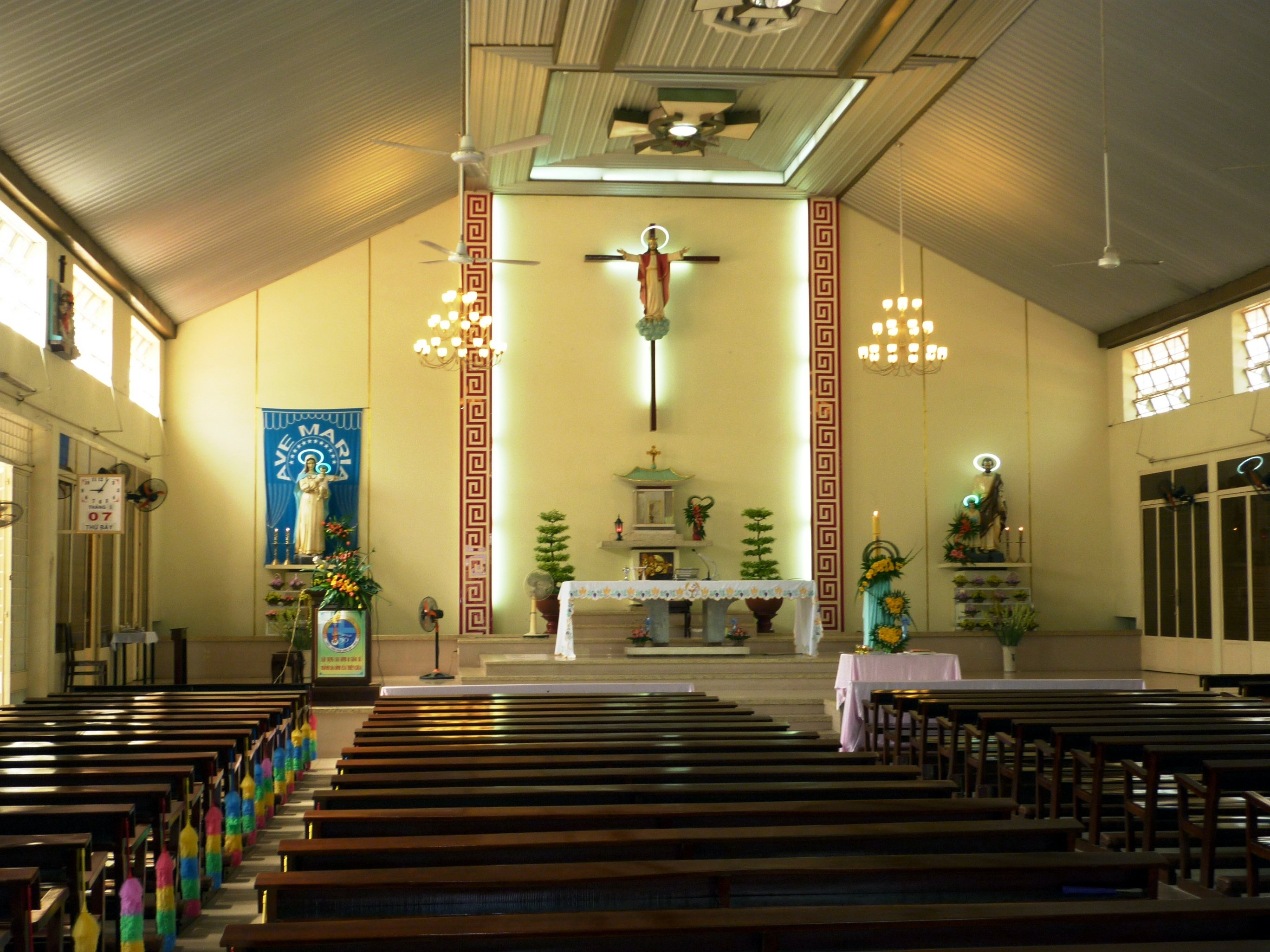 Bên trong nhà thờ Bùi Thượng, Xuân Lộc, Đồng Nai